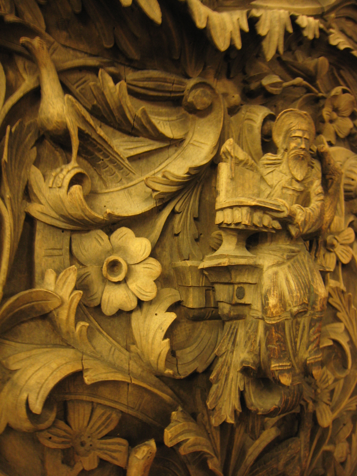 Владички стол од храмот "Св. Благовештение", детаљ.